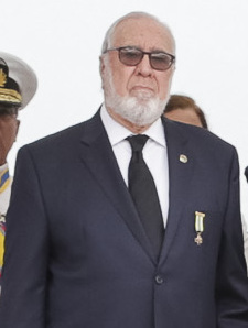 Guayaquil 25 de julio 2018.- Presidenta de la Asamblea Nacional, Elizabeth Cabezas, entregó ofrenda floral por los 77 años del combate de Jambelí. Fotos: Alexander Moya / Asamblea Nacional.